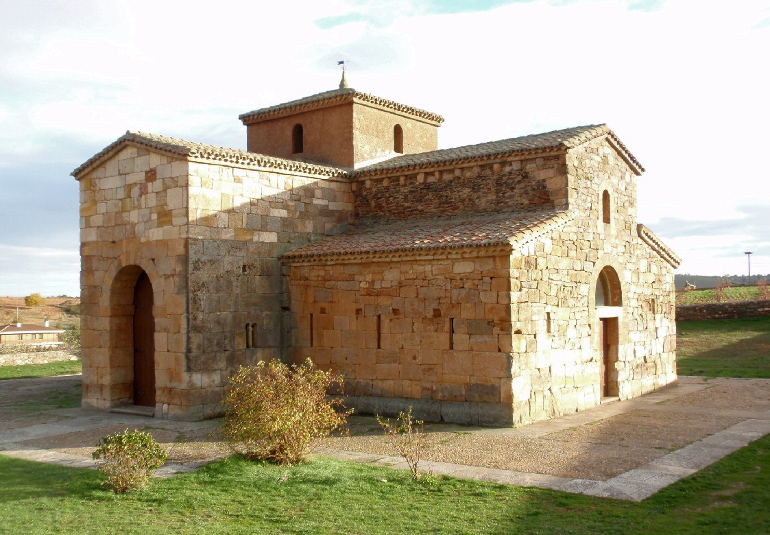 A germán népvándorlás emléke, vizigót bazilika (Basílica de San Pedro de la Nave